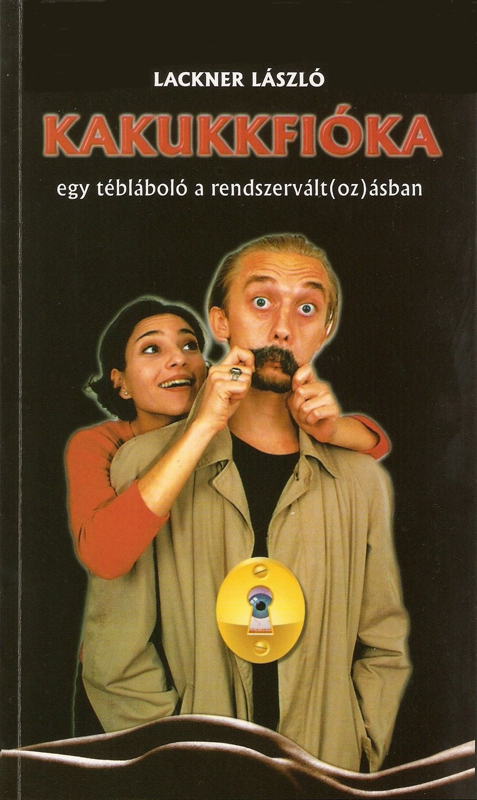 Lackner László Kakukkfióka című könyvének borítója – címlapterv: Kristóf Attila (modellek: Széll Horváth Lajos és Simon Andrea színművészek)